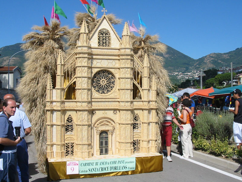 Immagine di un "carro di grano" durante la festa del grano di Foglianise, rappresentante una facciata laterale della cattedrale di Santa Croce d'Orléans.